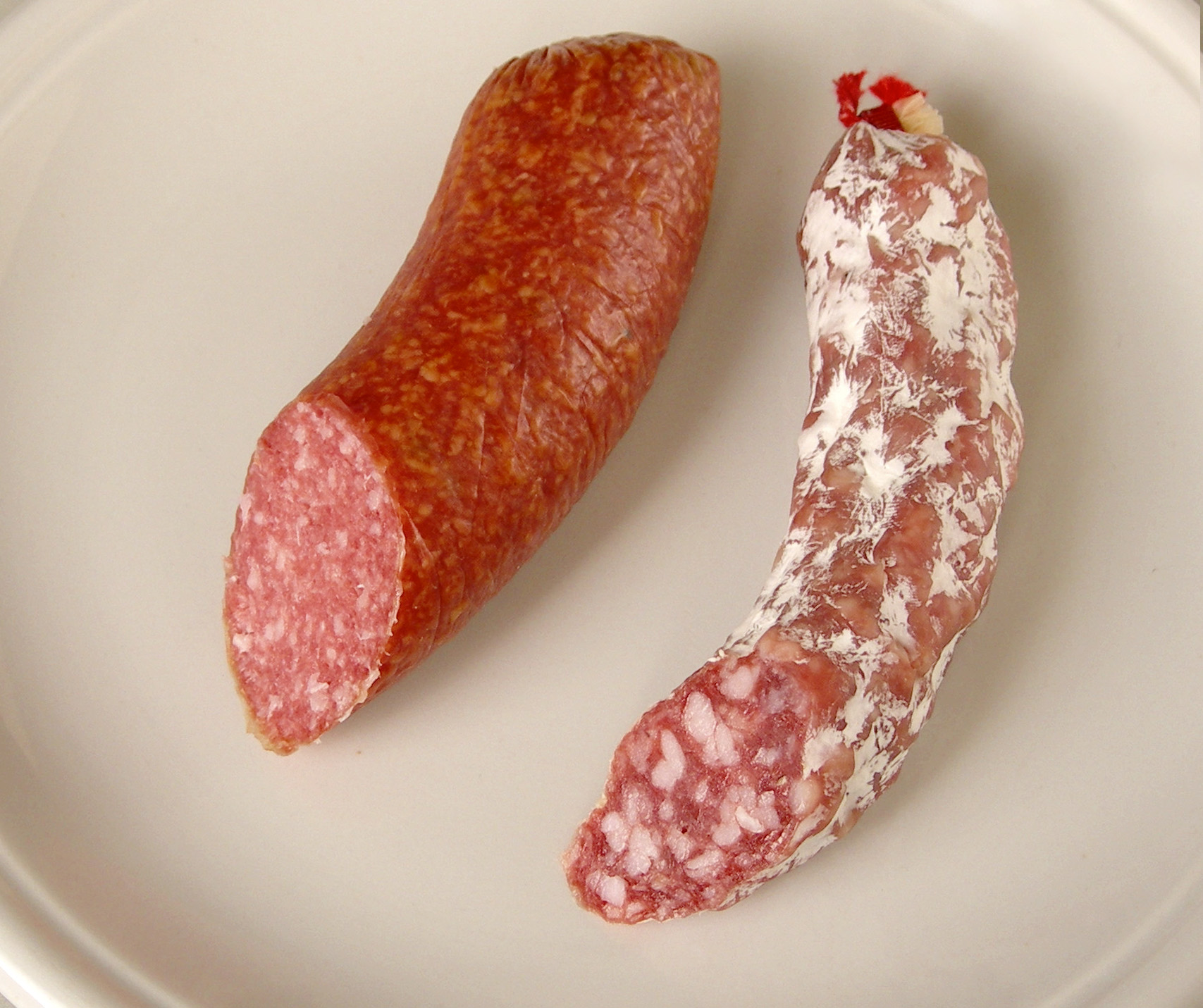 Rohwurst